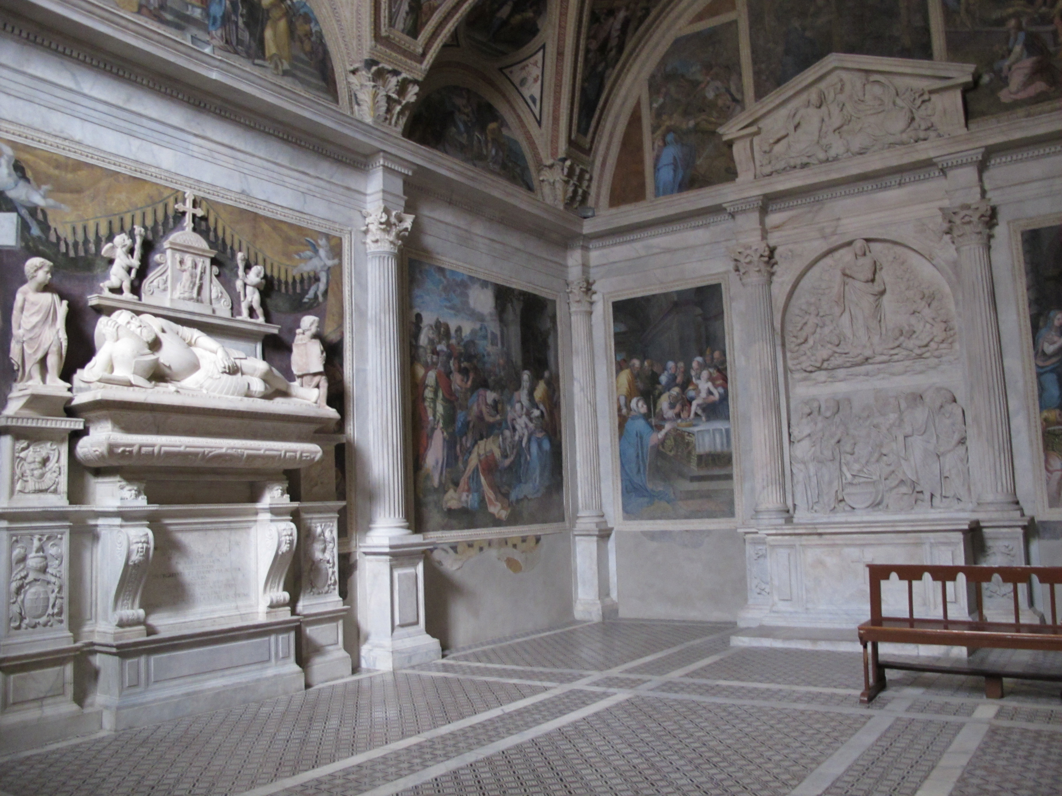 Chiesa di San Giovanni a Carbonara - Cappella Di Somma (Napoli).